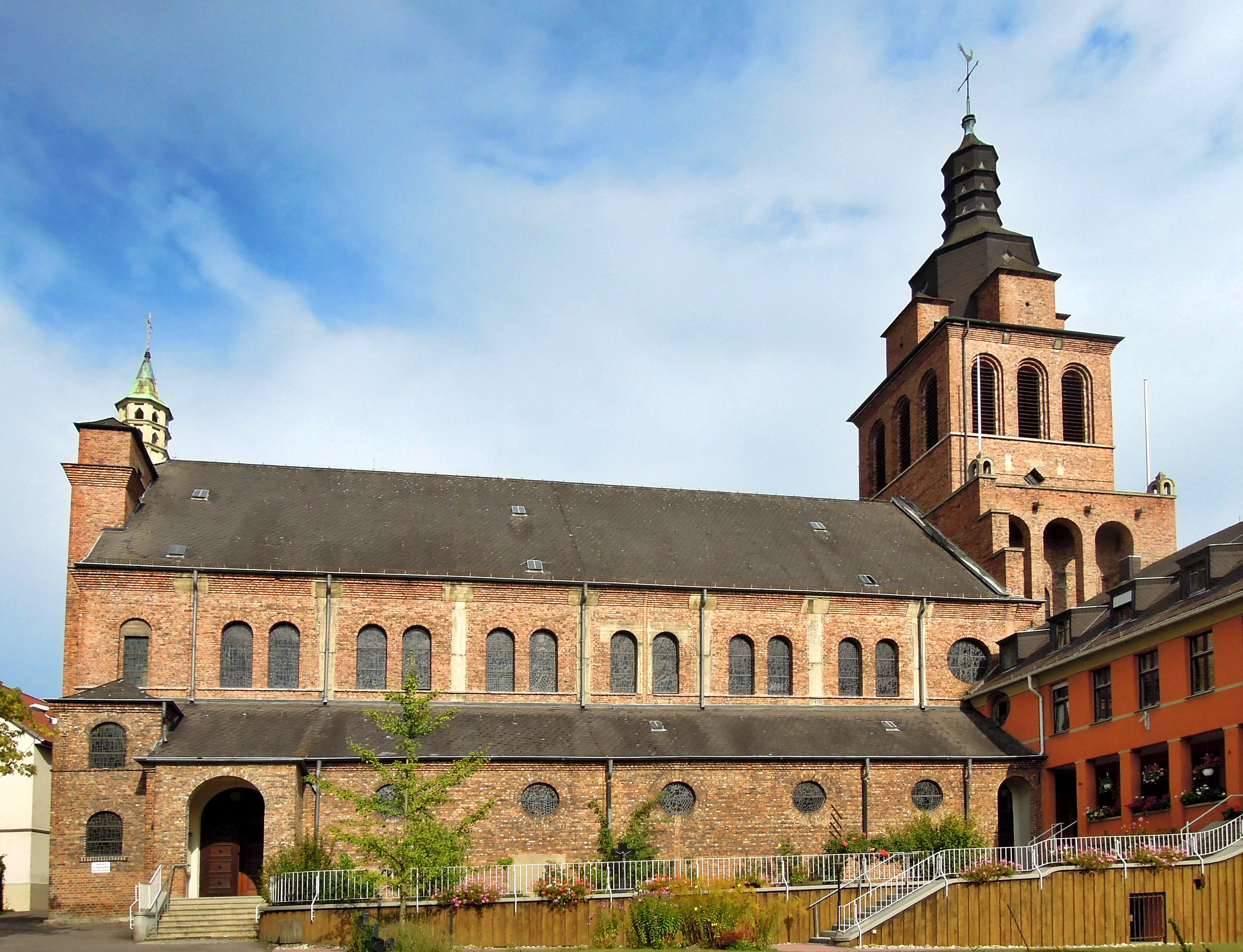 Am Kloster 6, kath. Pfarrkirche Allerheiligen, 1927–29 von Peter Marx (Einzeldenkmal)